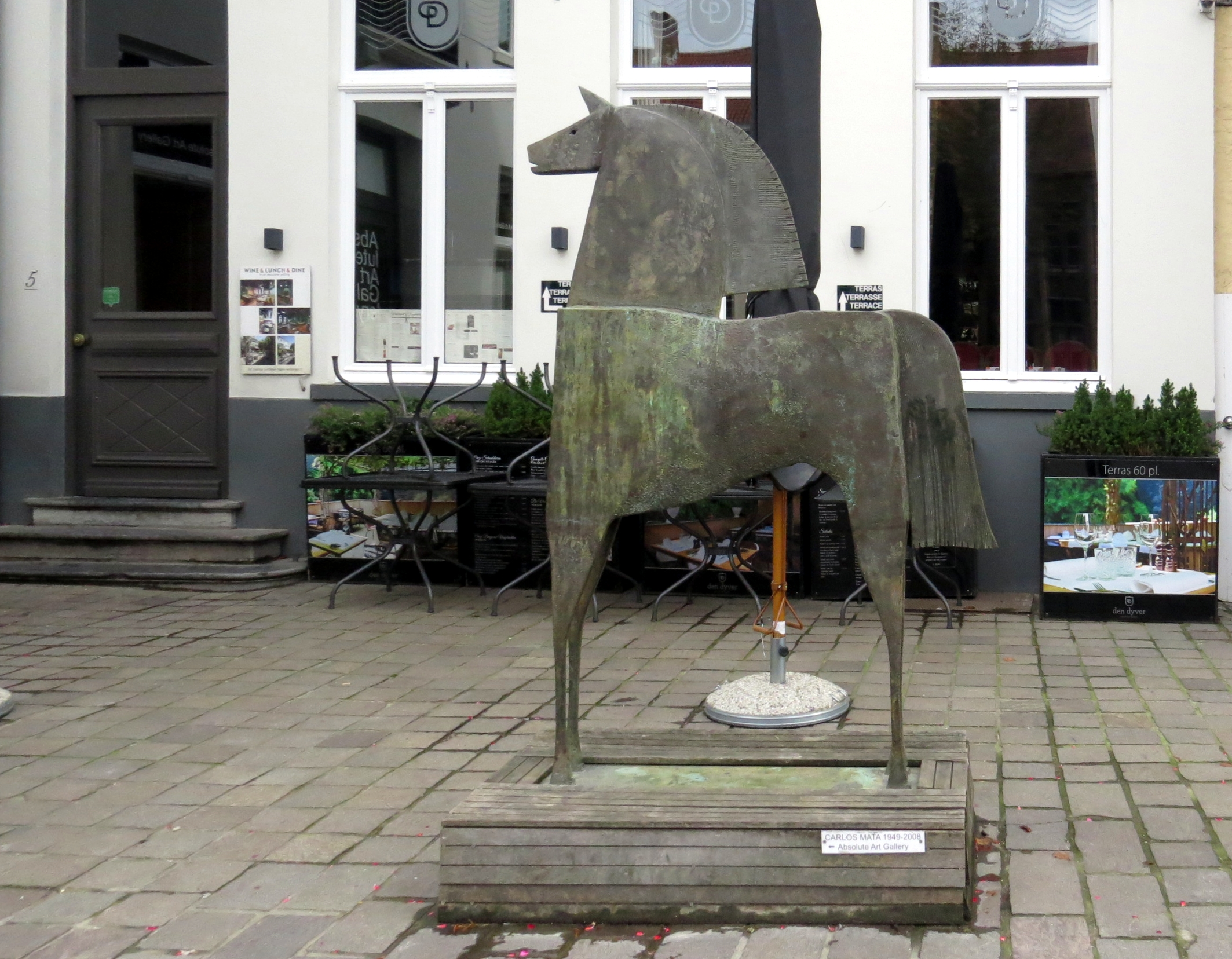 Stadt Brügge, Kunst von Carlos Mata, im öffentlichen Straßenland